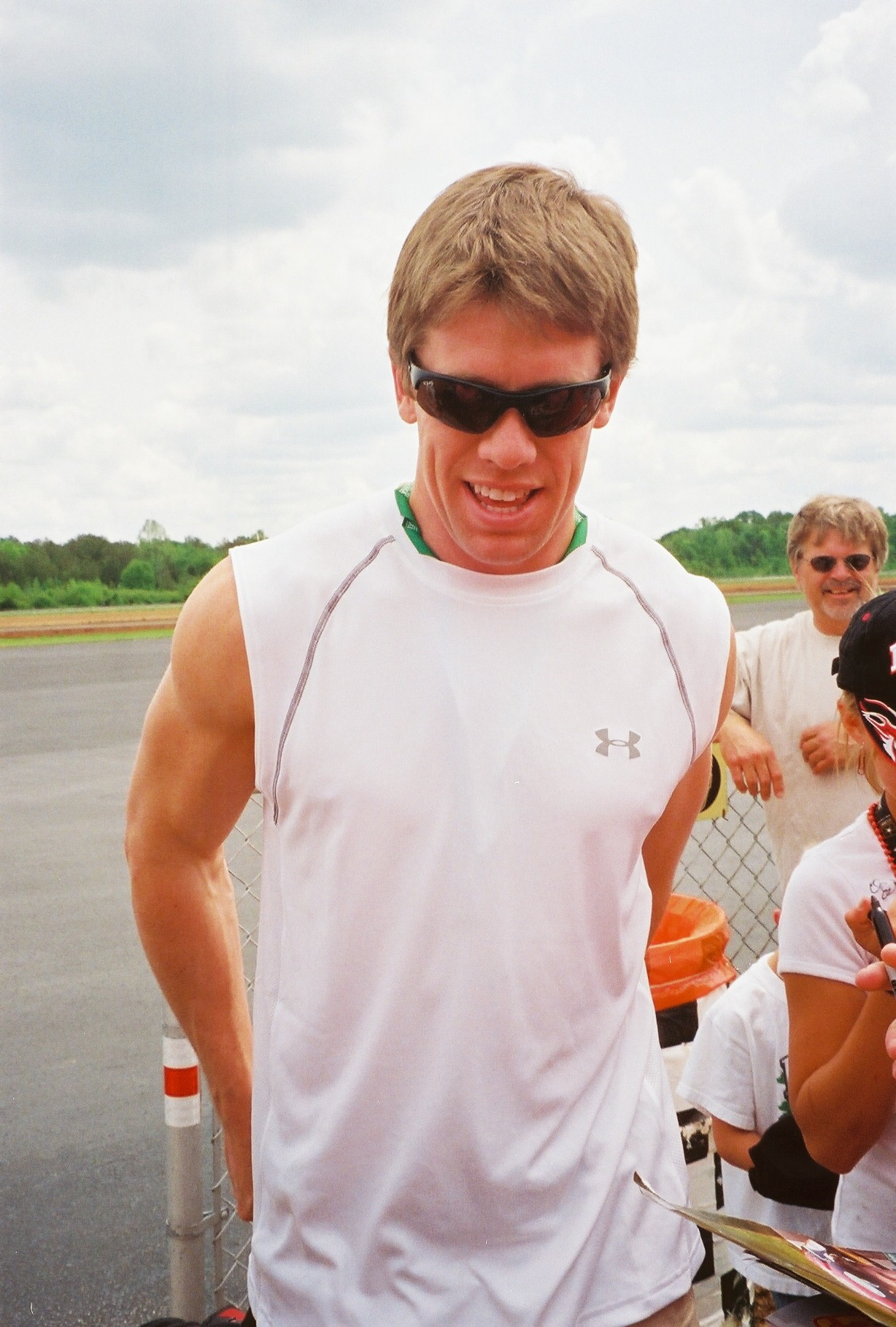 Talladega, AL 4-08 Talladega Race